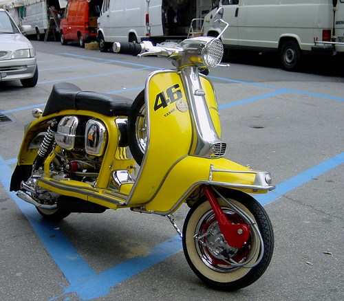 Lambretta